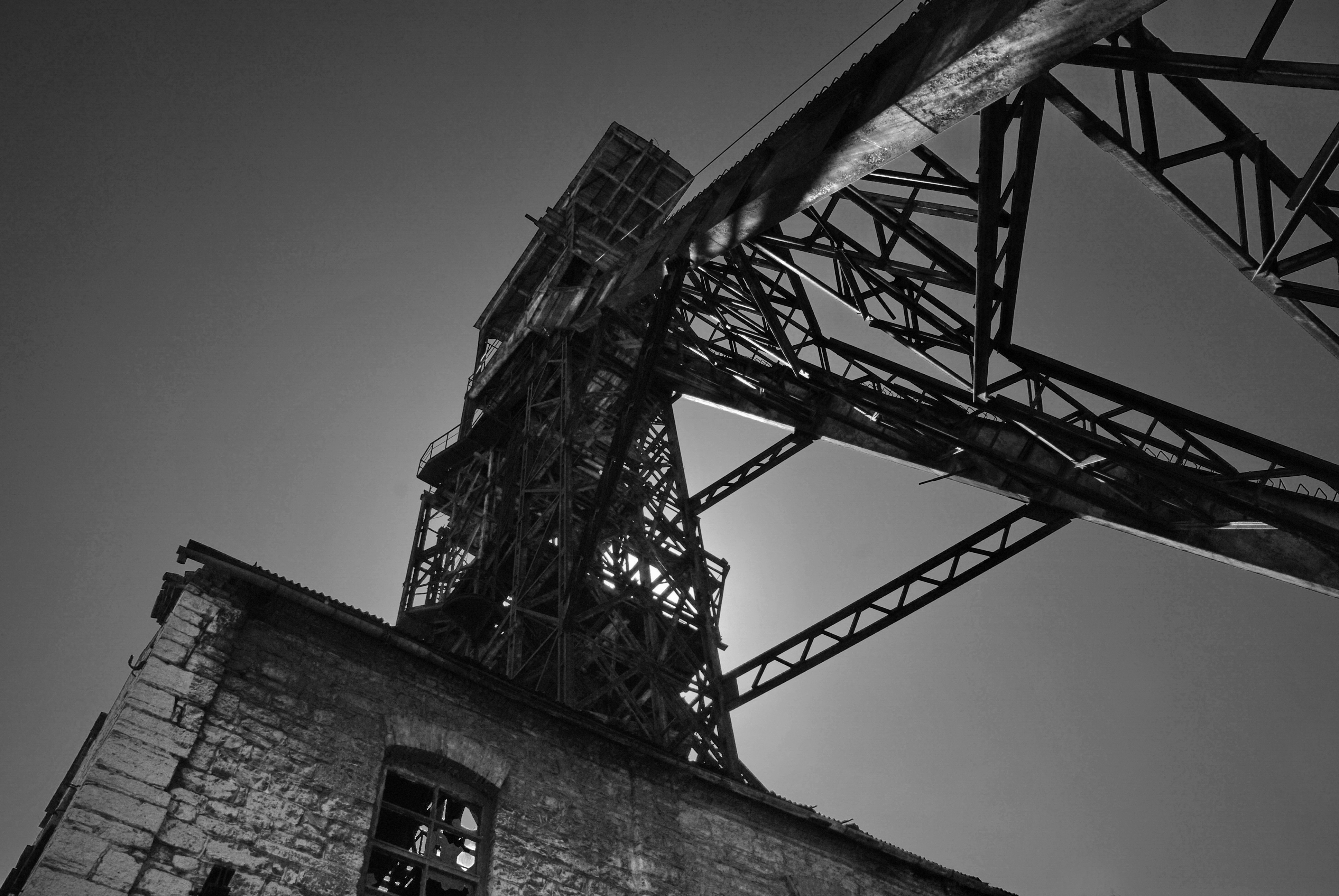 Puțul I - Casa Turnului de extracție cu aburi 01